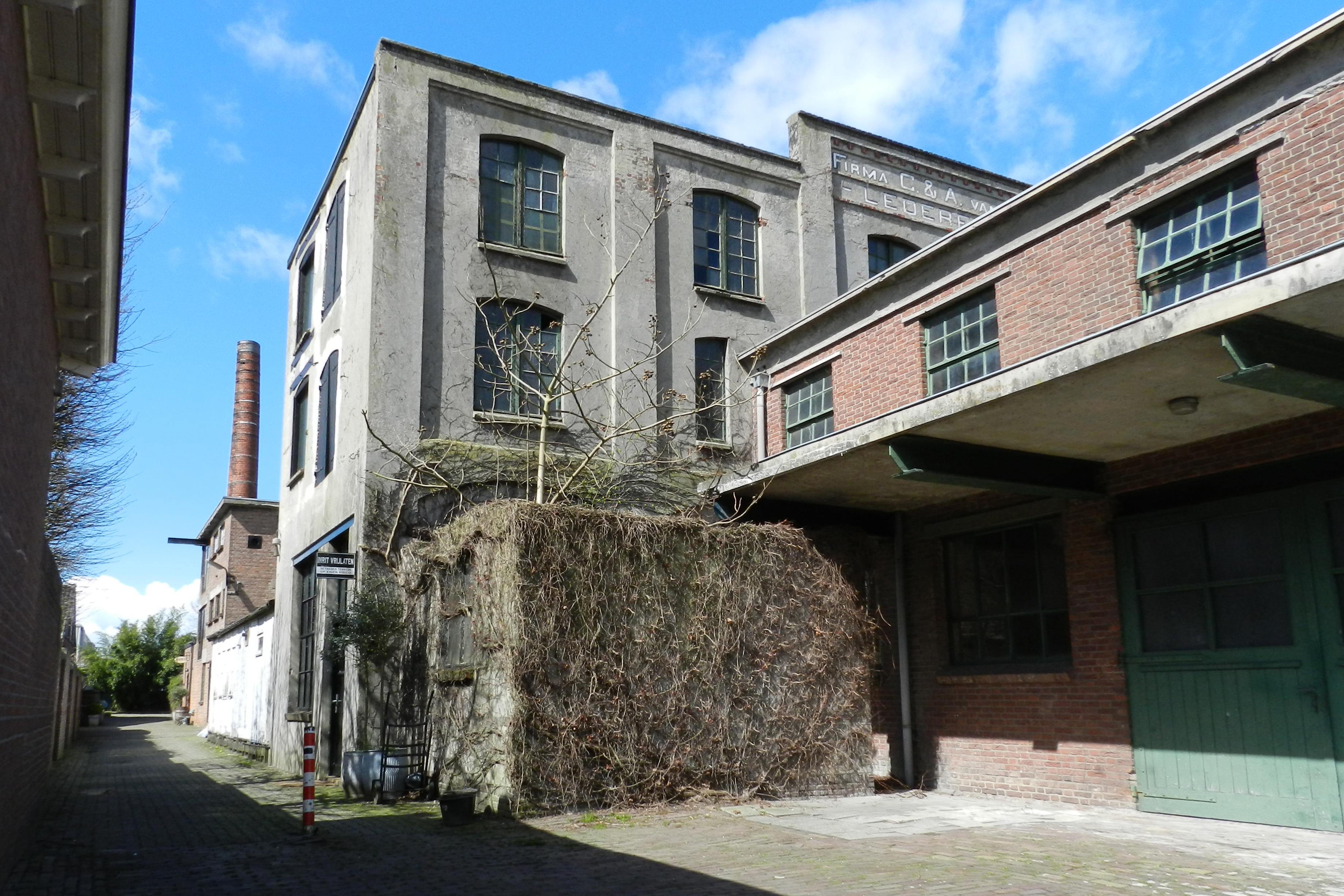 Op een smal langgerekt terrein van een uit ca. 1870 daterende school, die rond 1911 verkocht werd aan Adrianus van der Maade die van de school een looierij maakte. Hierin werd in de jaren dertig van de vorige eeuw, met gebruikmaking van de bestaande hoofdbouw, de leerfabriek van C. en A. van Gorp, gevestigd. Het langgerekte gebouwencomplex bestond uit kantoor/magazijn (dit deel valt niet onder de monumentenlijst) met daarachter productiehallen en aanbouwen. Het kantoor (1948) heeft schoon metselwerk onder een plat dak. Hierachter staat het voormalige schoolgebouw, hier was op de begane grond de walskamer. De twee verdiepingen daarboven werden gebruikt als opslag en voor het drogen van huiden. De bovenzijde is verhoogd met daarop de tekst “C. & A. van Gorp Lederfabriek”. Bij het ketelhuis staat de hoge, met ijzeren banden beklede schoorsteen.